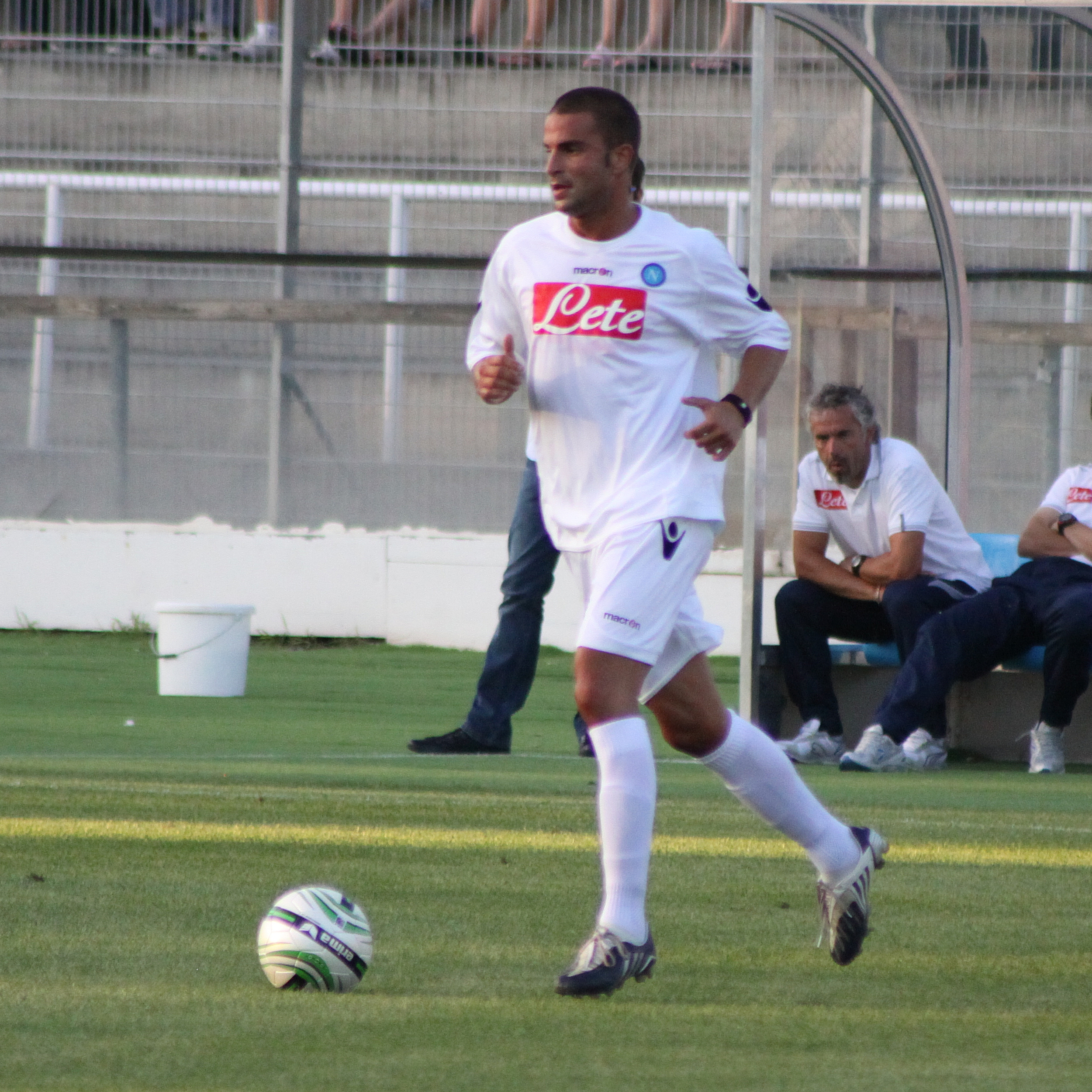 Manuele Blasi - SSC Neapel (3) Manuele Blasi - Società Sportiva Calcio Napoli